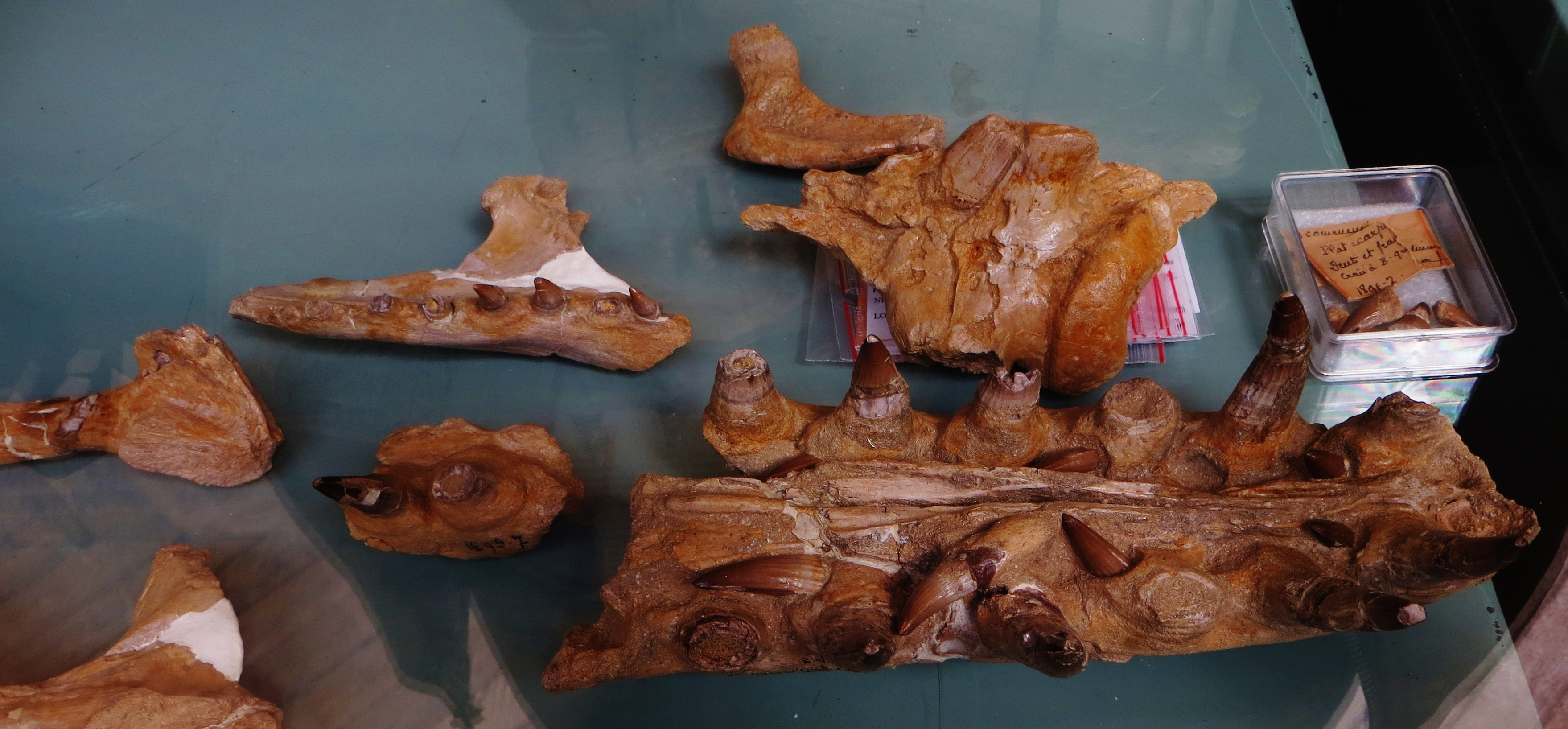 Fossil of Platecarpus, an extinct reptile- Took the photo at Musee d'Histoire Naturelle, Paris